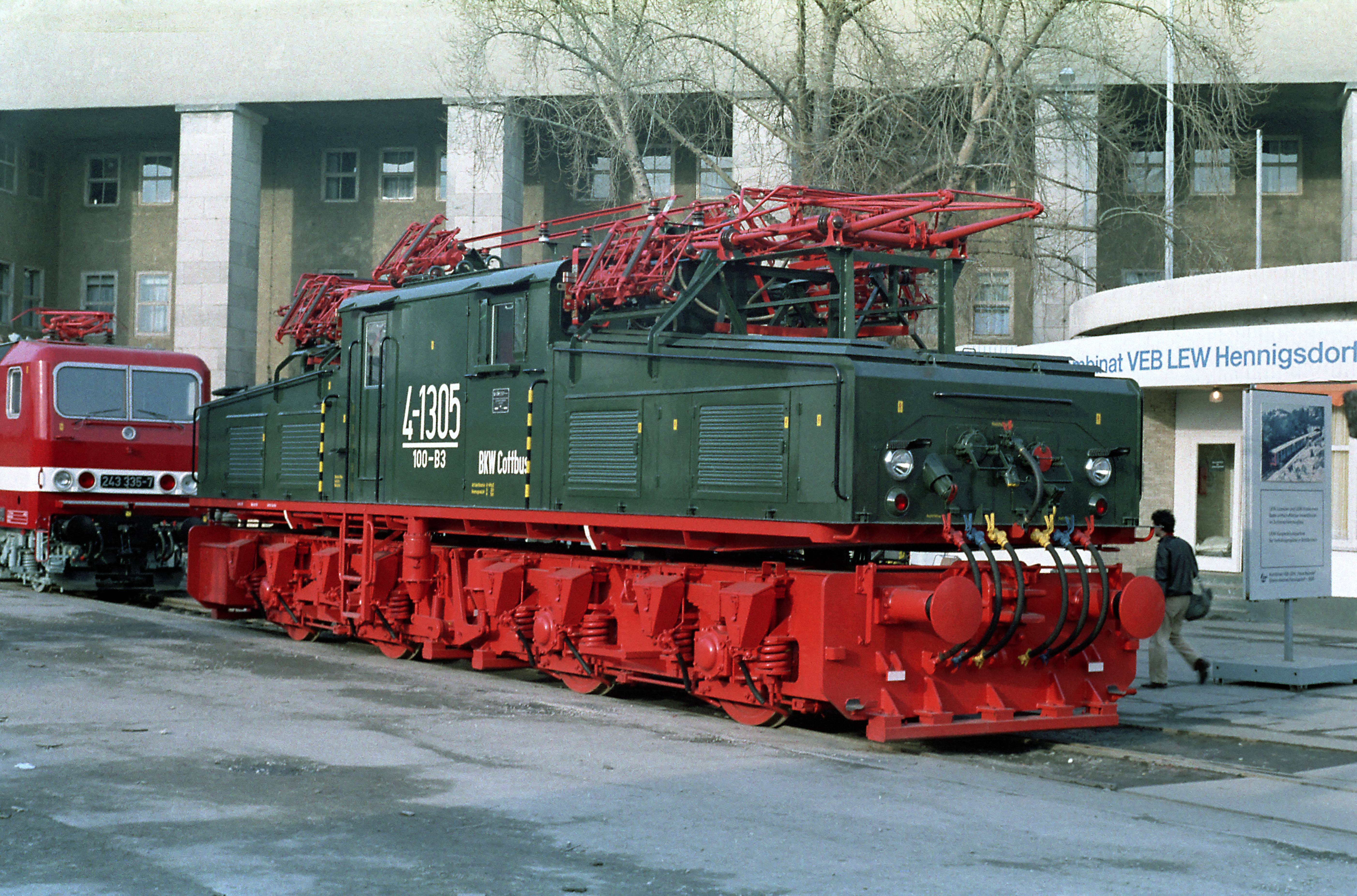 Gleichstrom-Industrieellok für Lausitzer Bergbaurevier, mit Stromabnehmern für Mittel- und Seitenfahrleitung (in zwei Höhen). Maschine mit Seitenpuffern und Bergbaukupplung. Die Schraubenkupplung für den Betrieb mit Regelfahrzeugen ist einsetzbar.